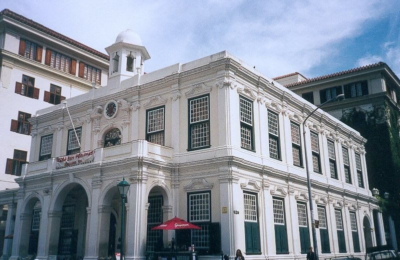 Die Ou Raadsaal (GNU-FDL, met erkenning aan Franse gebruiker Georgio)